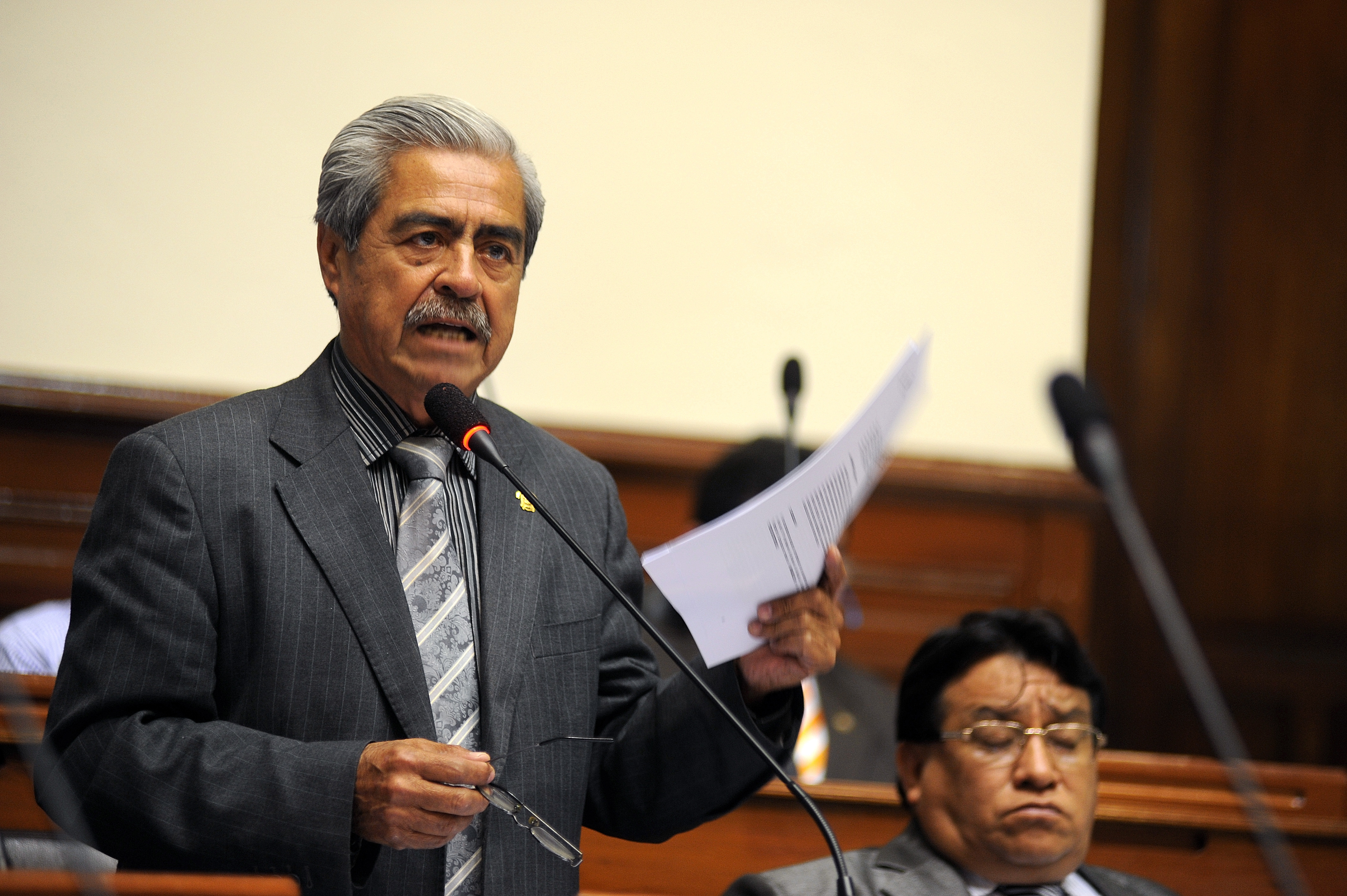 El congresista Franco Carpio Guerrero fija su posición en el debate parlamentario realizado esta tarde por el Pleno.